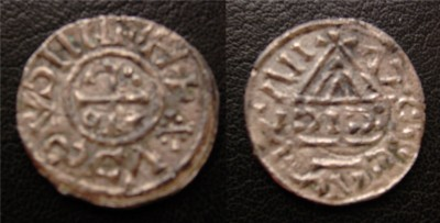 Regensburger Pfennig (Fälschung); GNU-FDL selbst fotografiiert